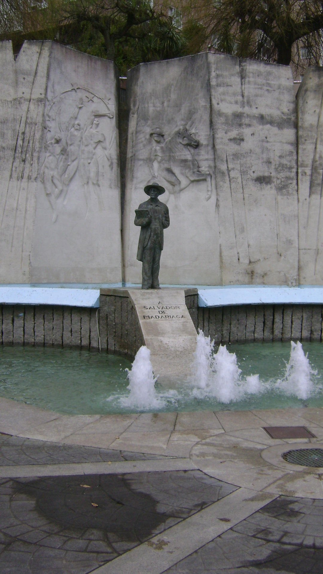 Estatua de Salvador de Madariaga en la plaza que lleva su nombre, La Coruña (España)